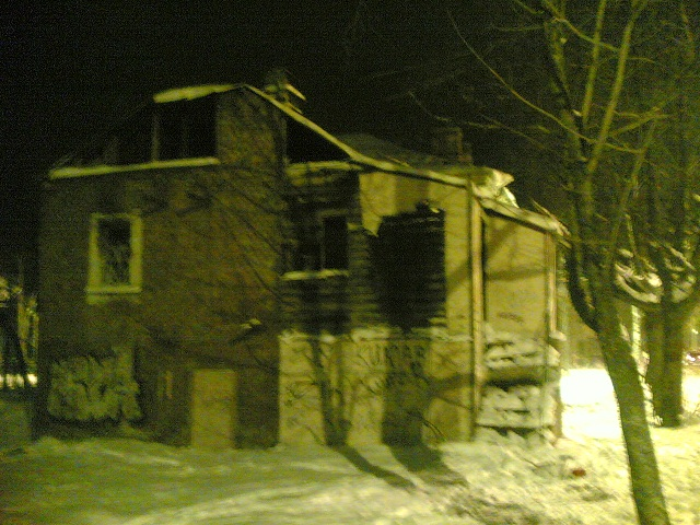 Дом в Ломоносове, в котором жил Костылёв,_Георгий_Дмитриевич.